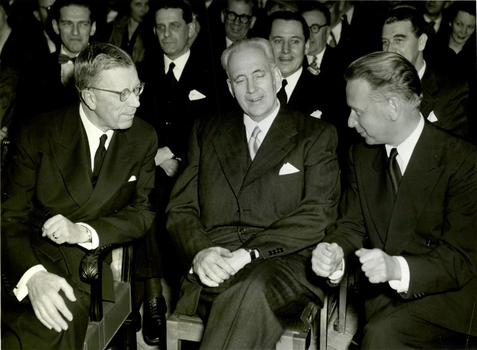 Gustaf VI Adolf, Ingemar Düring och Dag Hammarskjöld i Blå hallen 1954-03-12. Bilden infördes i Svenska Dagbladet 1954-03-13 sid 3 (